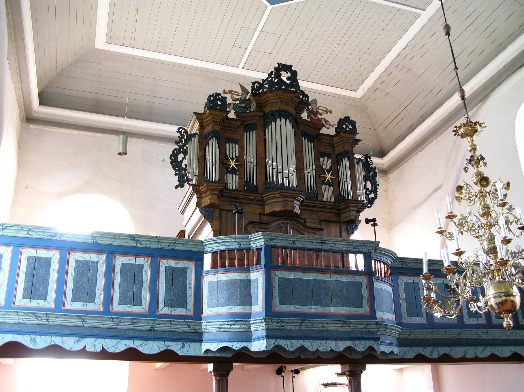 Orgel in Holtrop, Landkreis Aurich